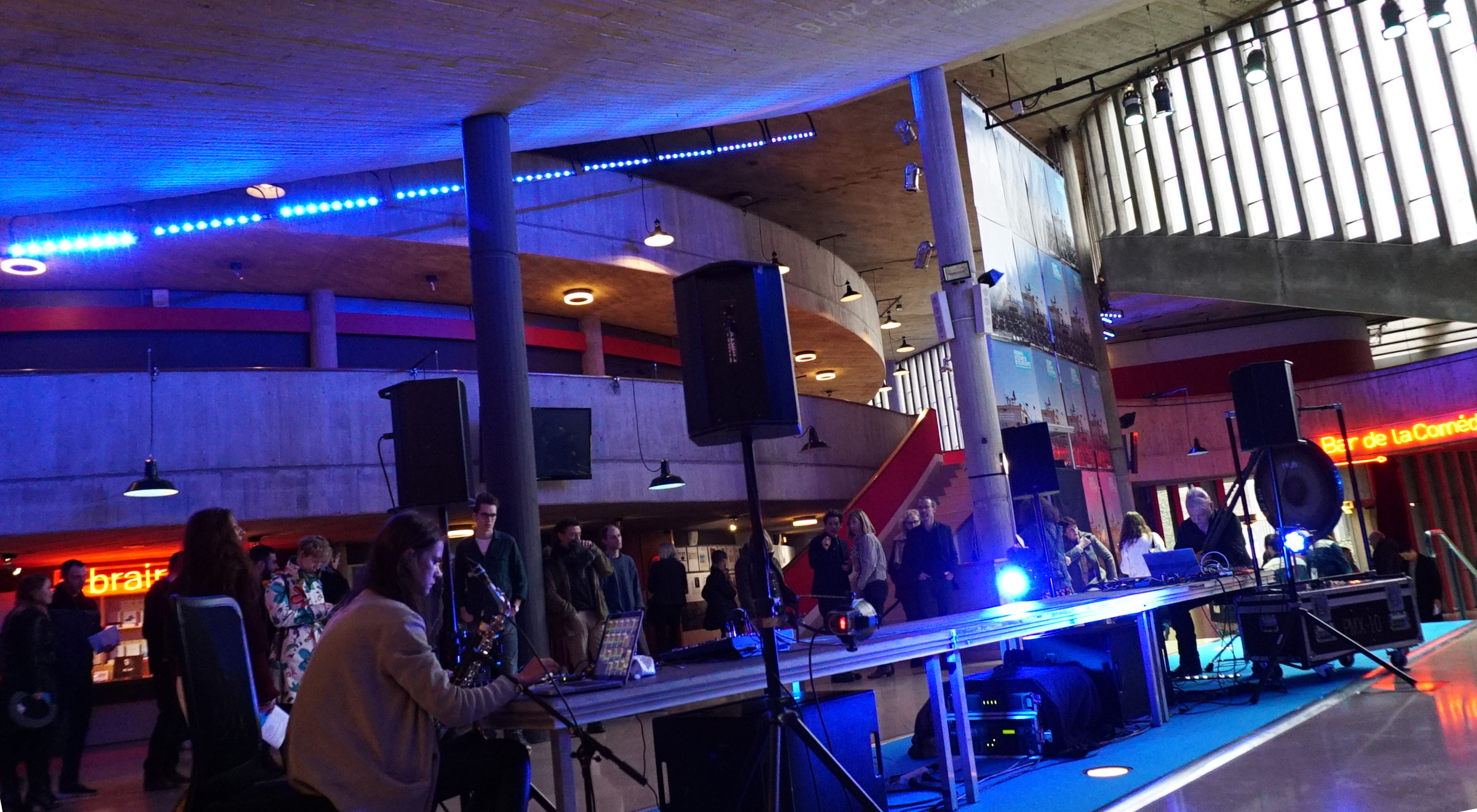 lors du festival reims scènes d'europe de 2016.